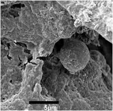 צילום מיקרוסקופ אלקטרוני של פיטוליטי חרדל השום